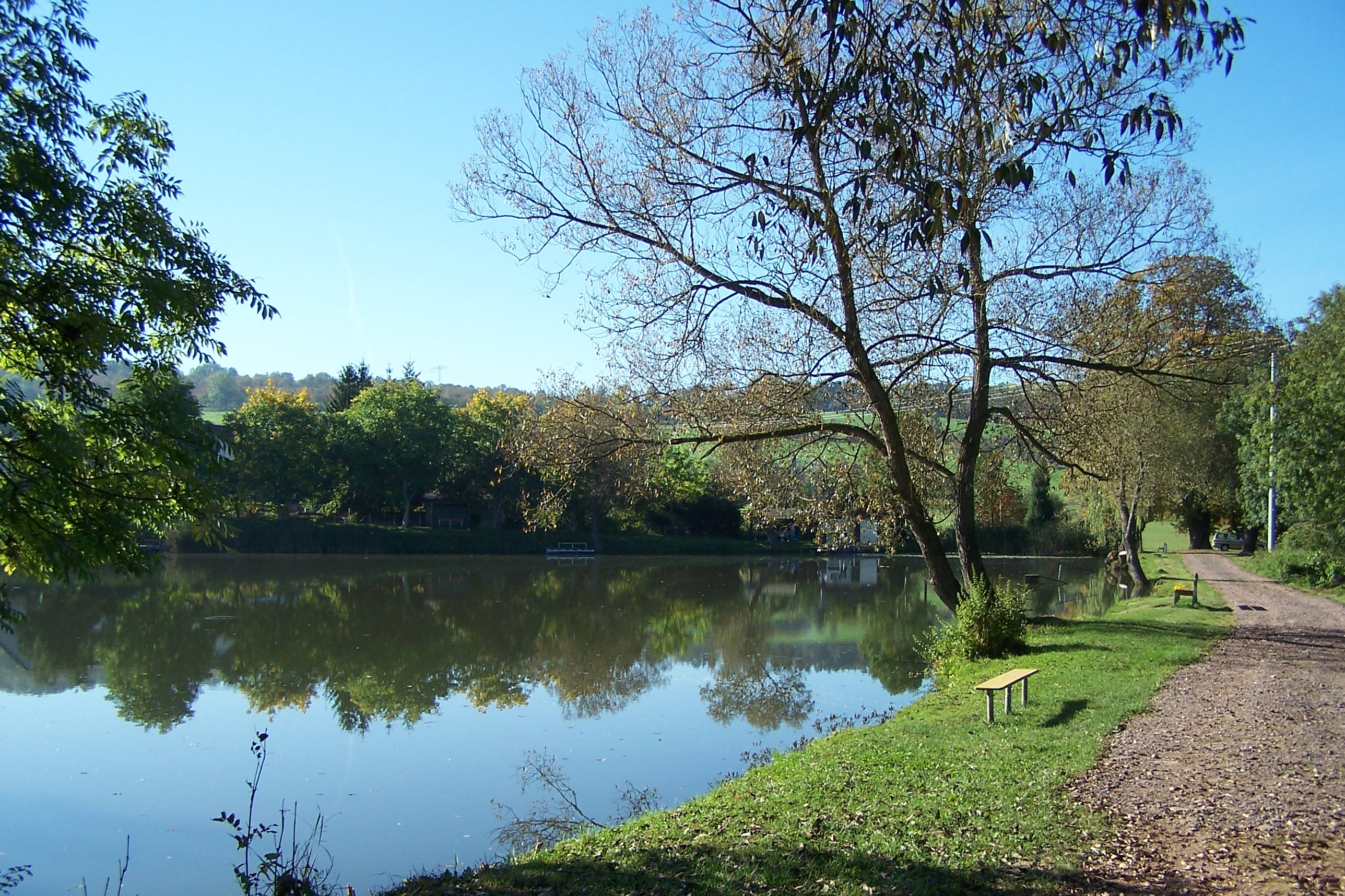 Ansicht von der Nordwestspitze des Teiches. Das Gewässer ist Pachtgewässer eines Angelsportvereins und darf von Spaziergängern und Naturliebhabern aufgesucht werden.